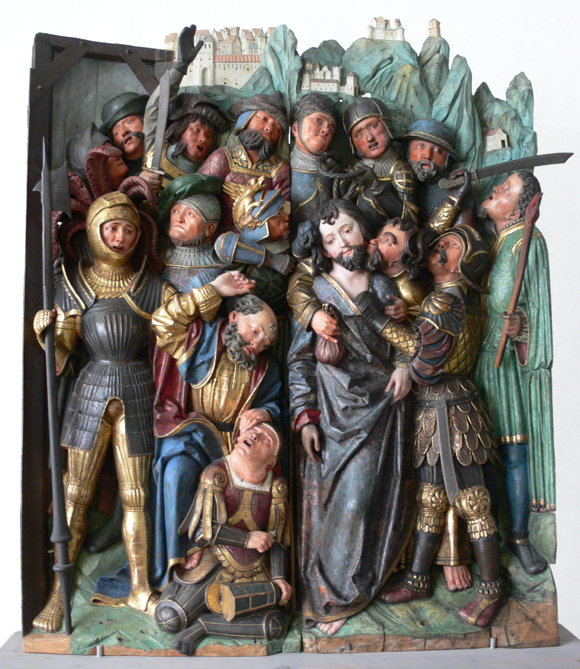 Niklaus Weckmann (Werkstatt): Gefangennahme Christi, Ulm um 1520 , Lindenholz; Fassung durch Caspar Strauß, Augsburg, 1625 (aus Kloster Zwiefalten) Landesmuseum Württemberg, Stuttgart; Inv. 375a